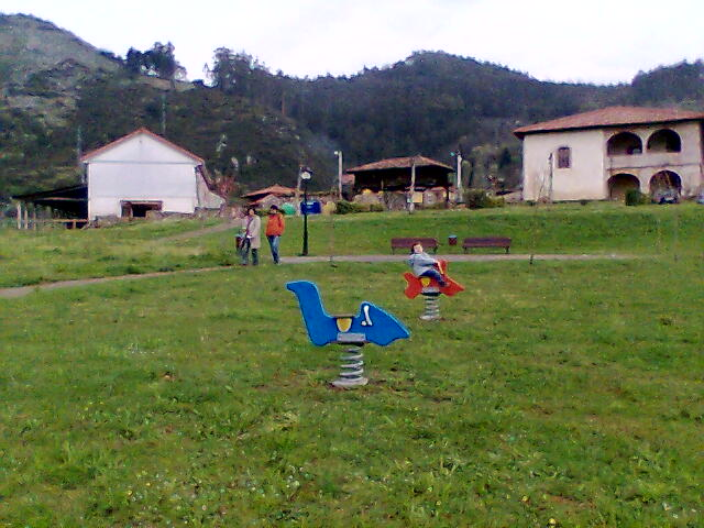 Pueblo de San Roman y palaci Valdes y cueva de la peña al fondo